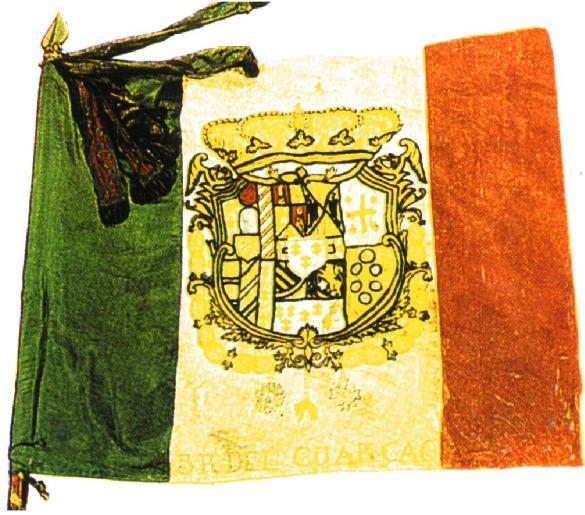 Bandiera Colonnella del 3° Reggimento Cacciatori della Guardia Reale del Regno delle Due Sicilie (25.06.1860-13.02.1861) recto